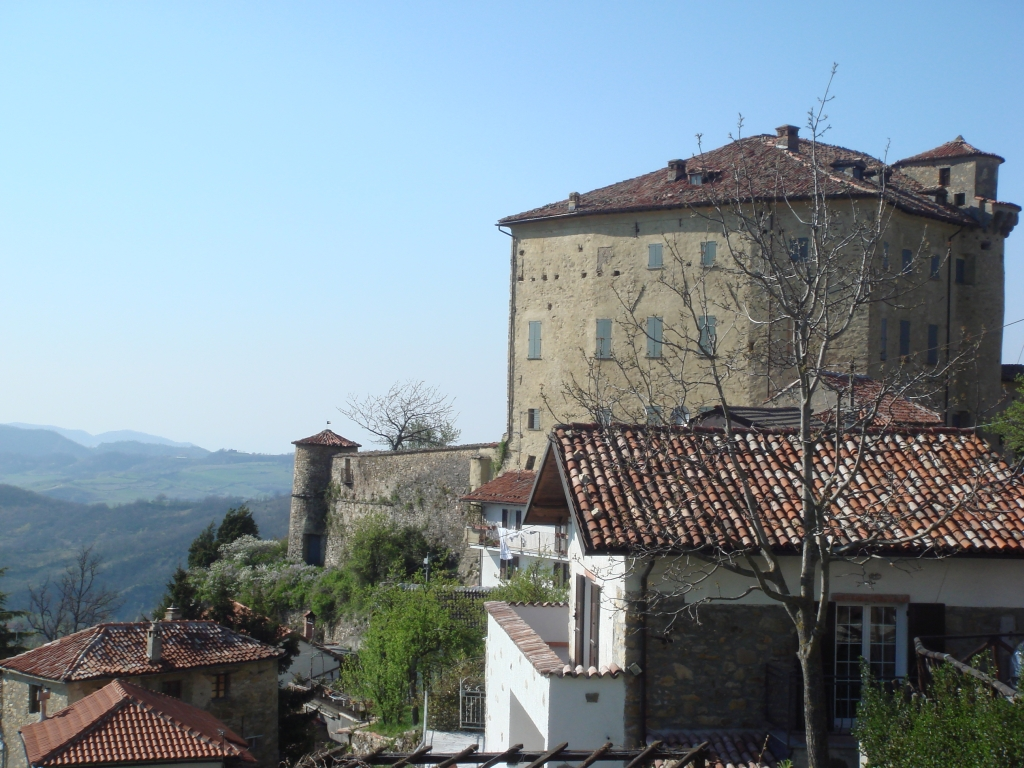 particolare del Castello della frazione di Borgo Adorno (Cantalupo Ligure)